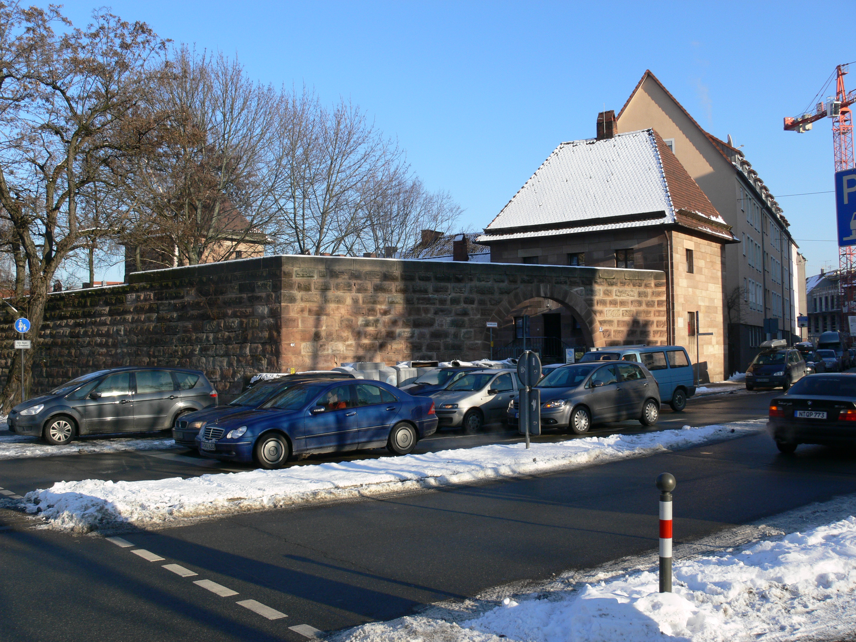 Nürnberg, Stadtbefestigung Westtor (Befestigungslücke zwischen Türmen Grün B und Grün C)